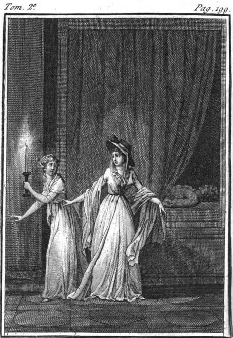 Frontispice du livre Les Mystères d’Udolphe, d'Ann Radcliffe, traduit par Victorine de Chastenay, Paris, Maradan, 1798, Tome II.